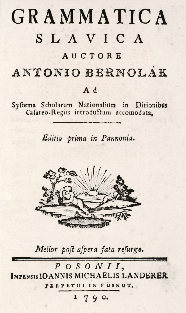 Титульная страница книги Антона Бернолака Grammatica Slavica, изданной в 1790 году.